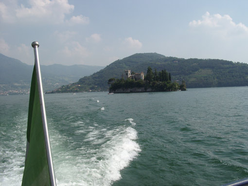 Lago d'Iseo (o di Sebino) - Montisola.